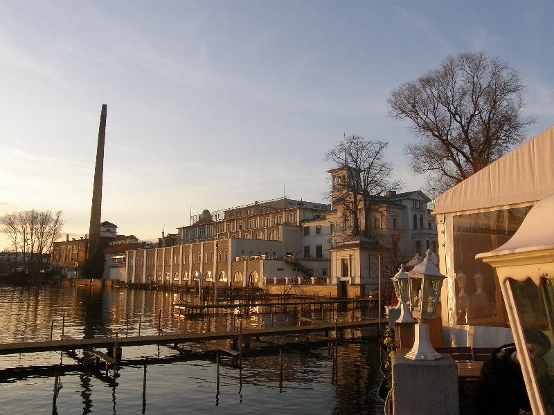 Bilder aus der Berlin Friedrichshagen